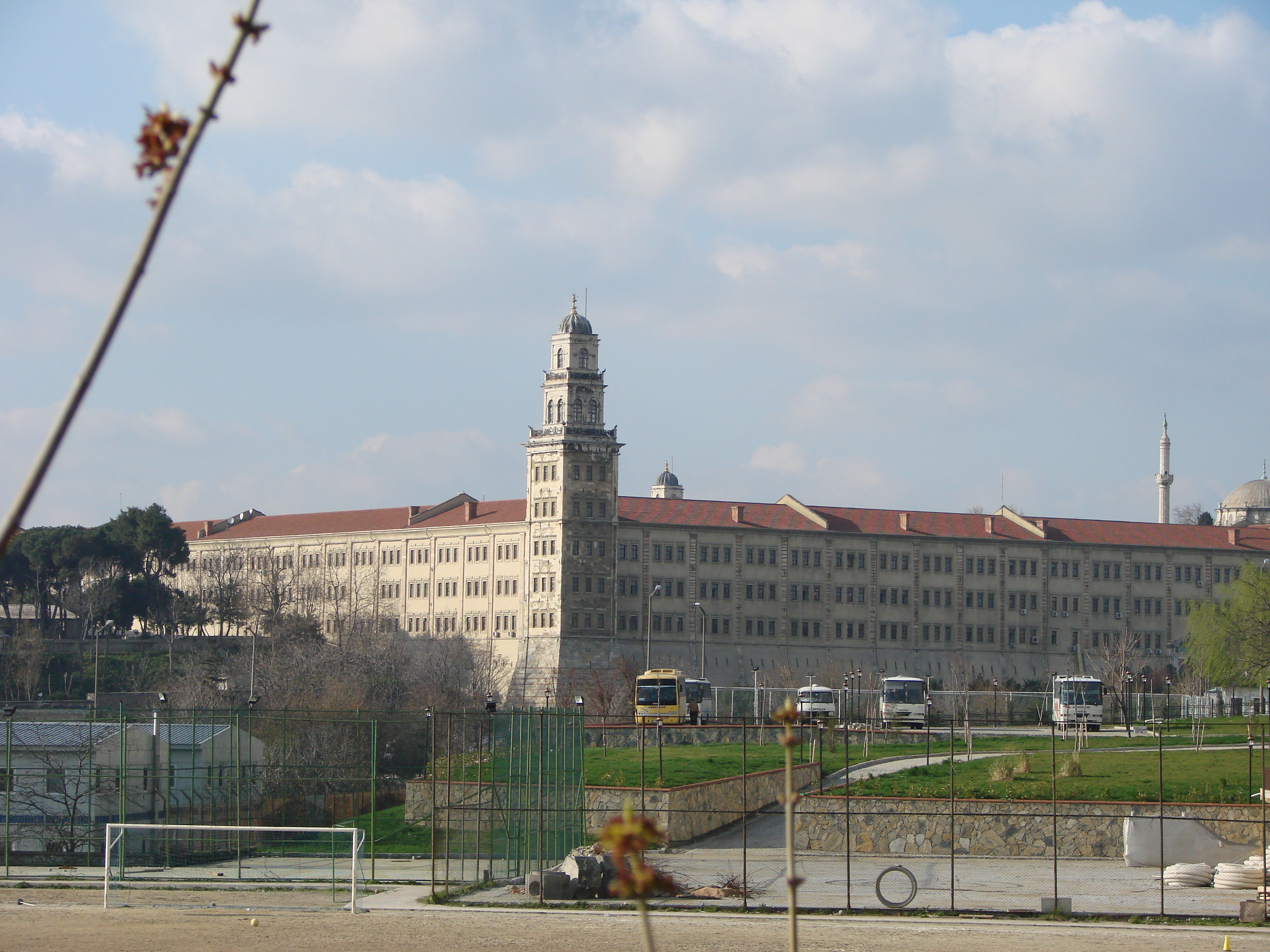 Selimiye Kışlası Üsküdar, İstanbul